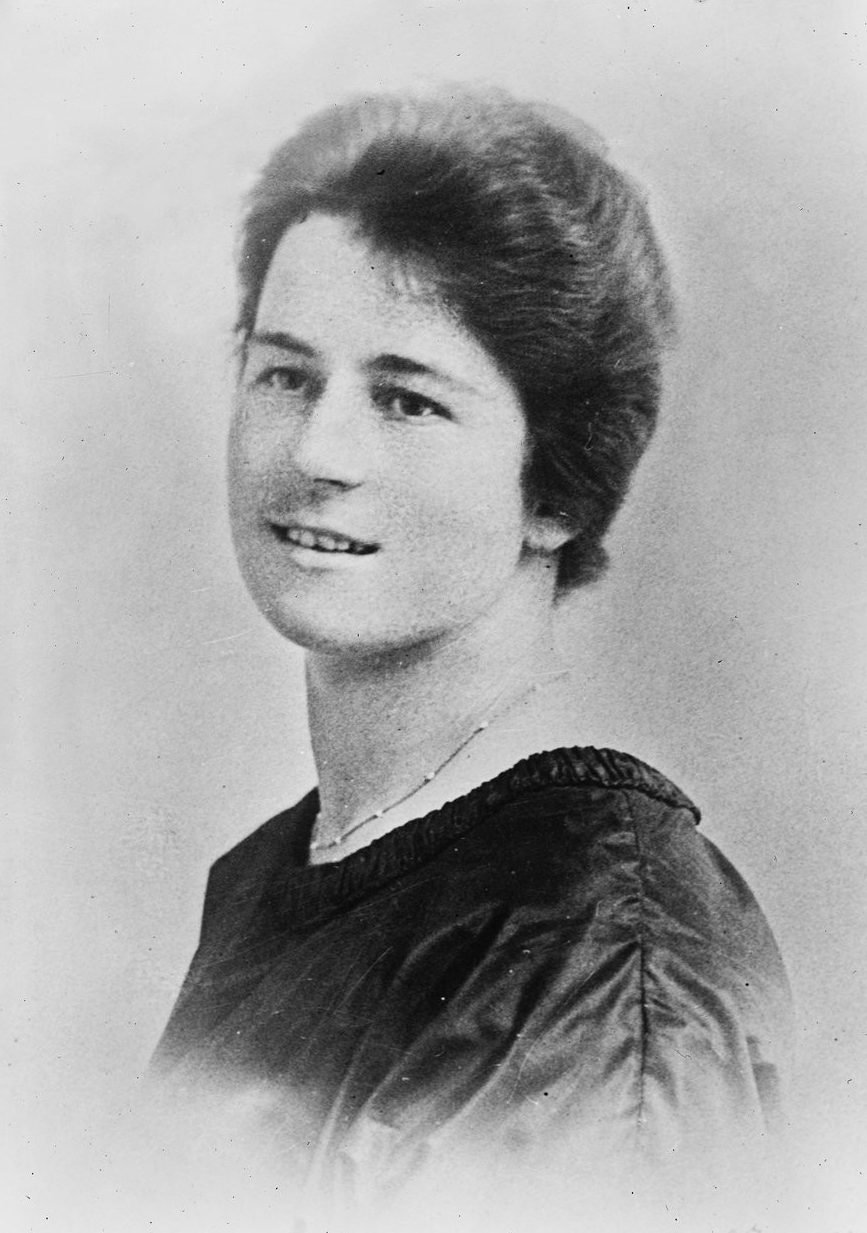 Miss [Dorothy] Wrinch, docteur ès sciences [de l'université de Londres] : [photographie de presse] / [Agence Rol]